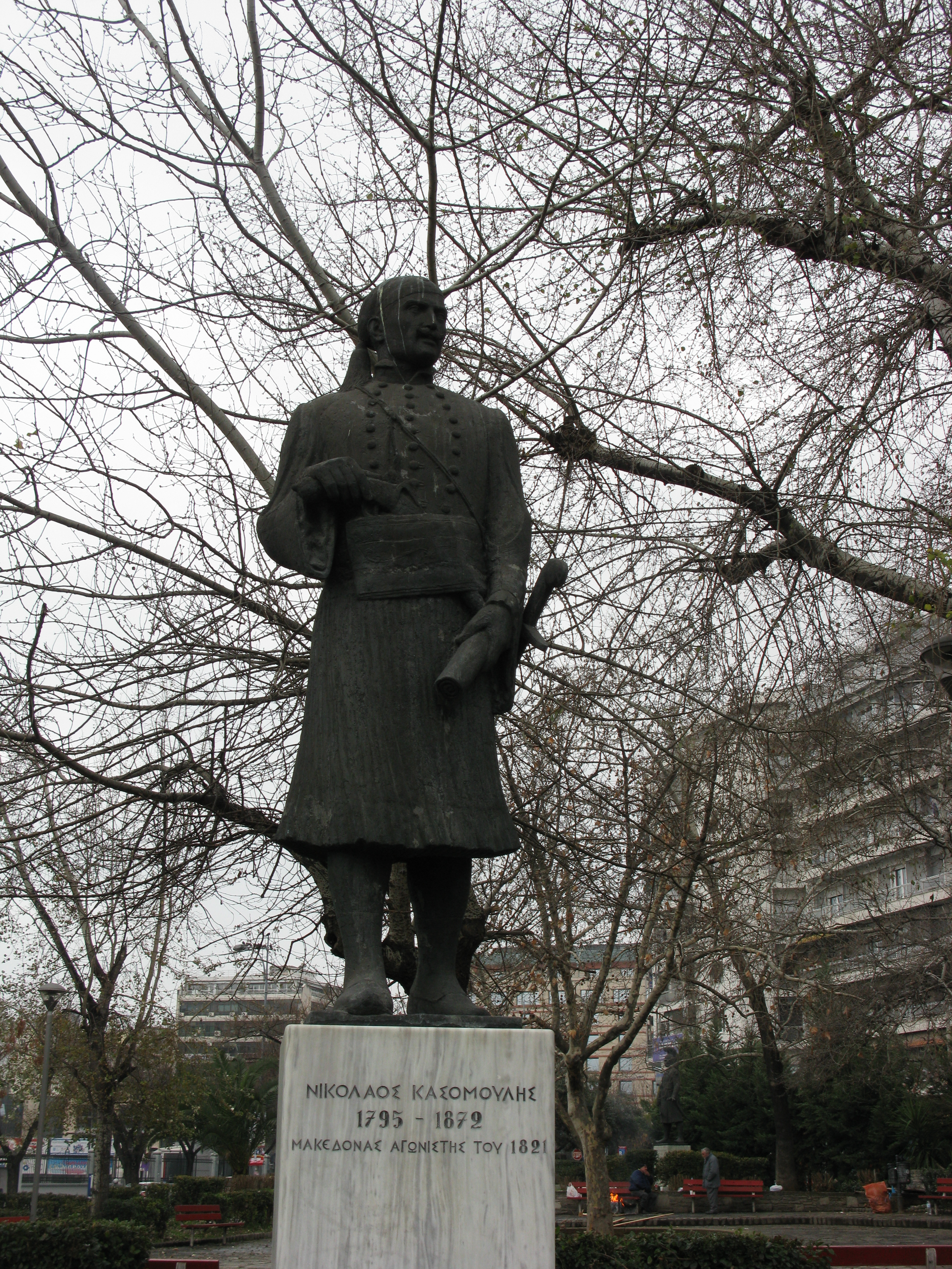 Статуя на Николаос Касомулис в Солун.